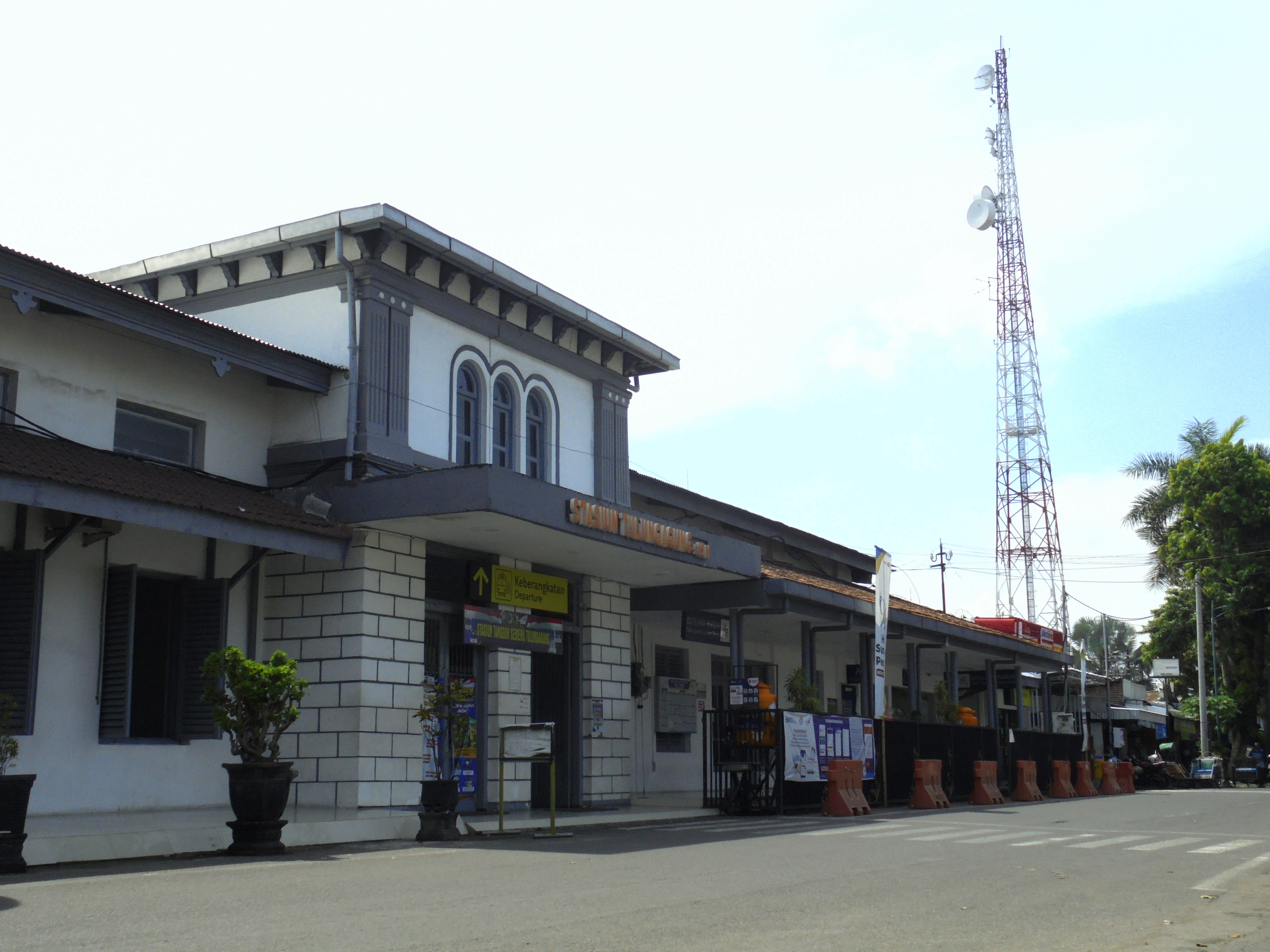 Tampak depan Stasiun Tulungagung pada tahun 2020